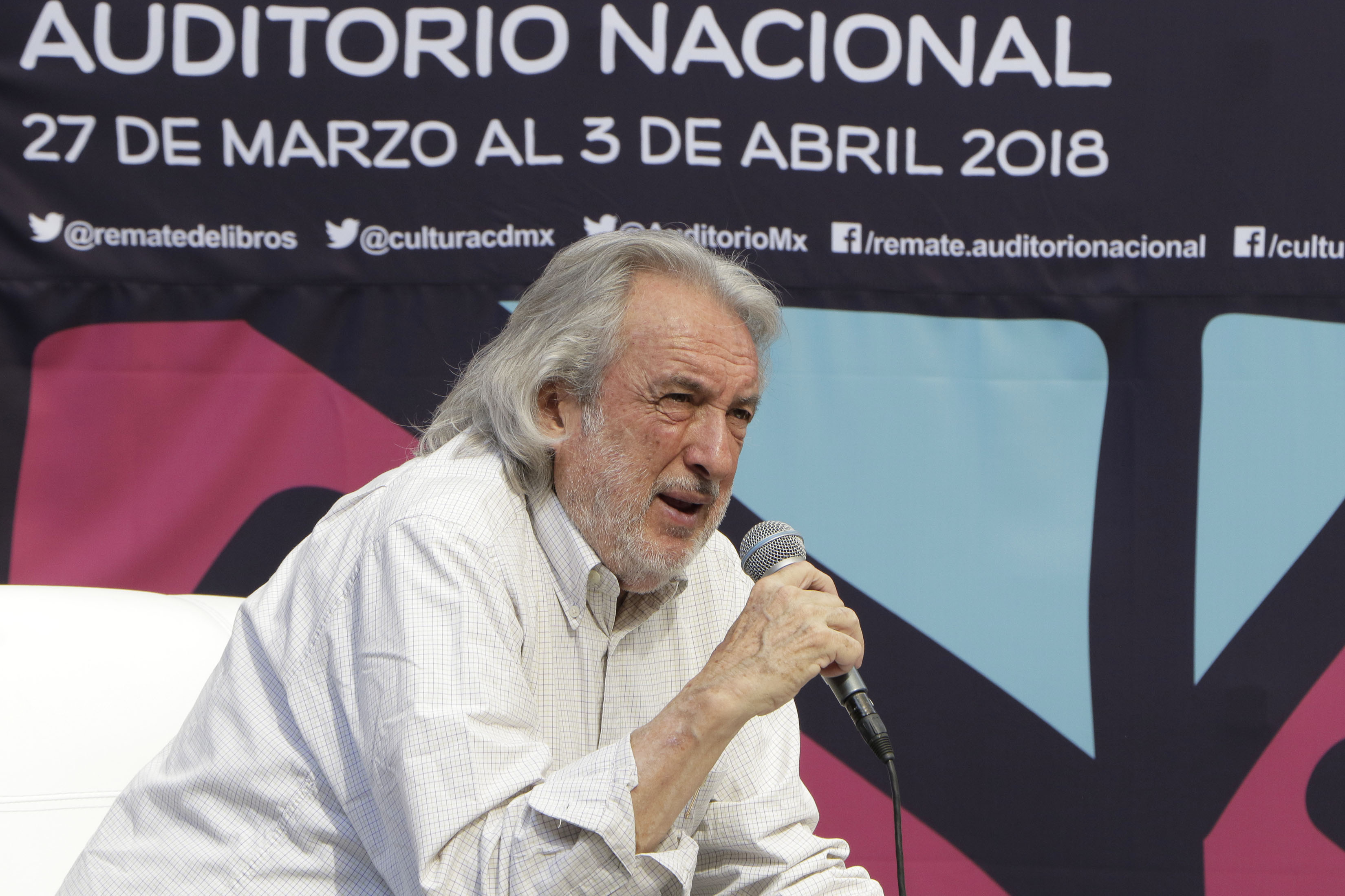 Miércoles 28 de marzo de 2018. Foro Juan José Arreola, en el marco del 12º Gran Remate de Libros de Auditorio Nacional, se realizó la charla: 90 años de Carlos Fuentes, con Hernán Lara Zavala. Fotografía: Tania Victoria / Secretaría de Cultura CDMX.